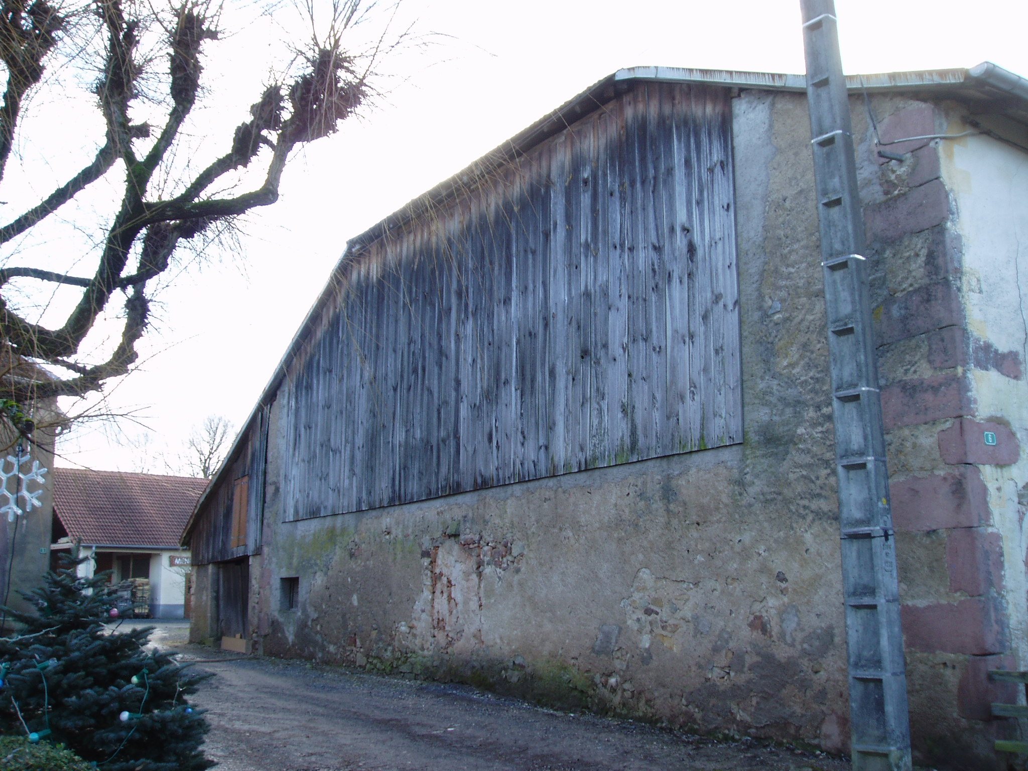 Ramée ou bardage du pignon supérieur dans les Vosges